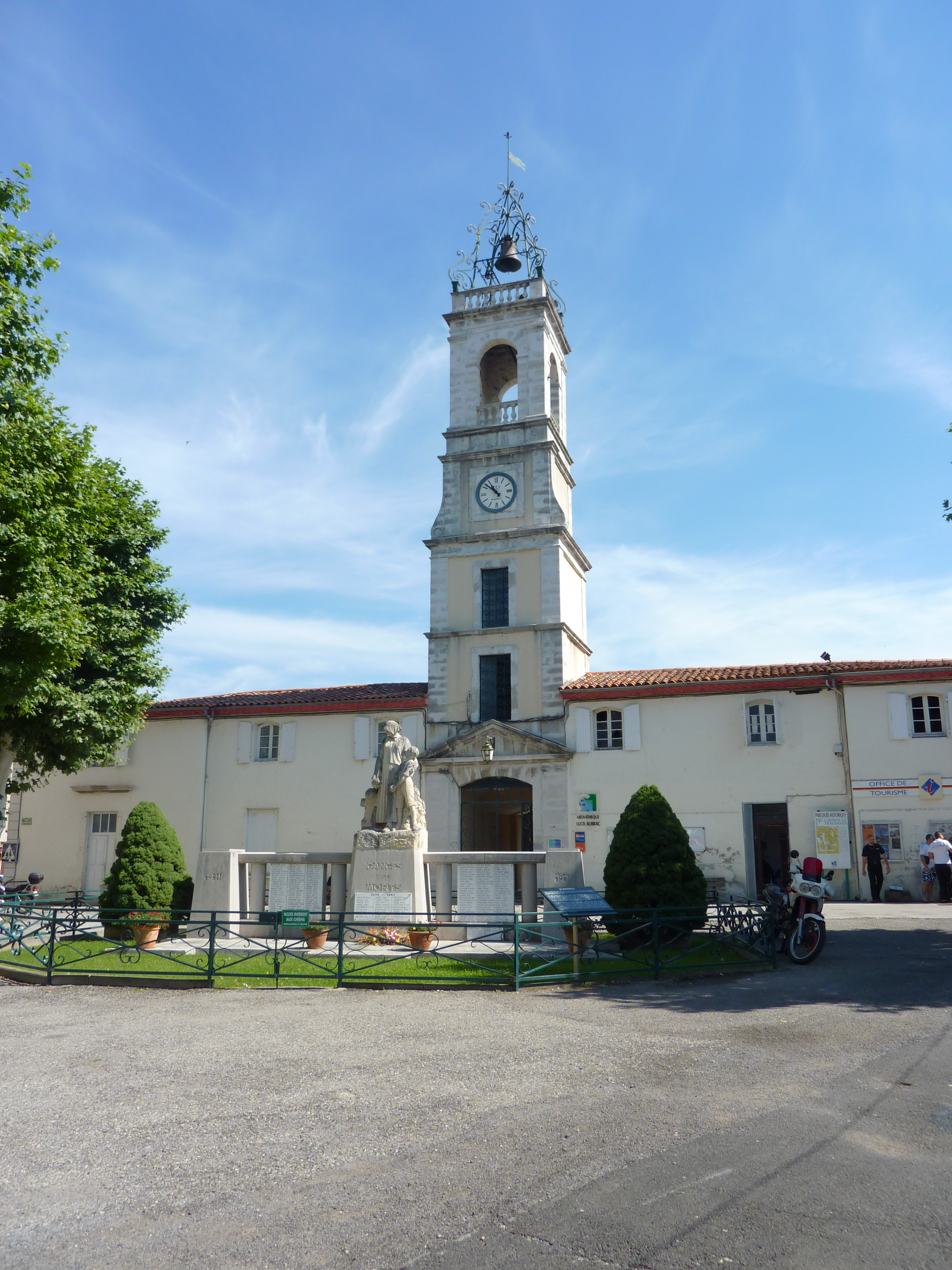 Ganges: l'hôtel de ville